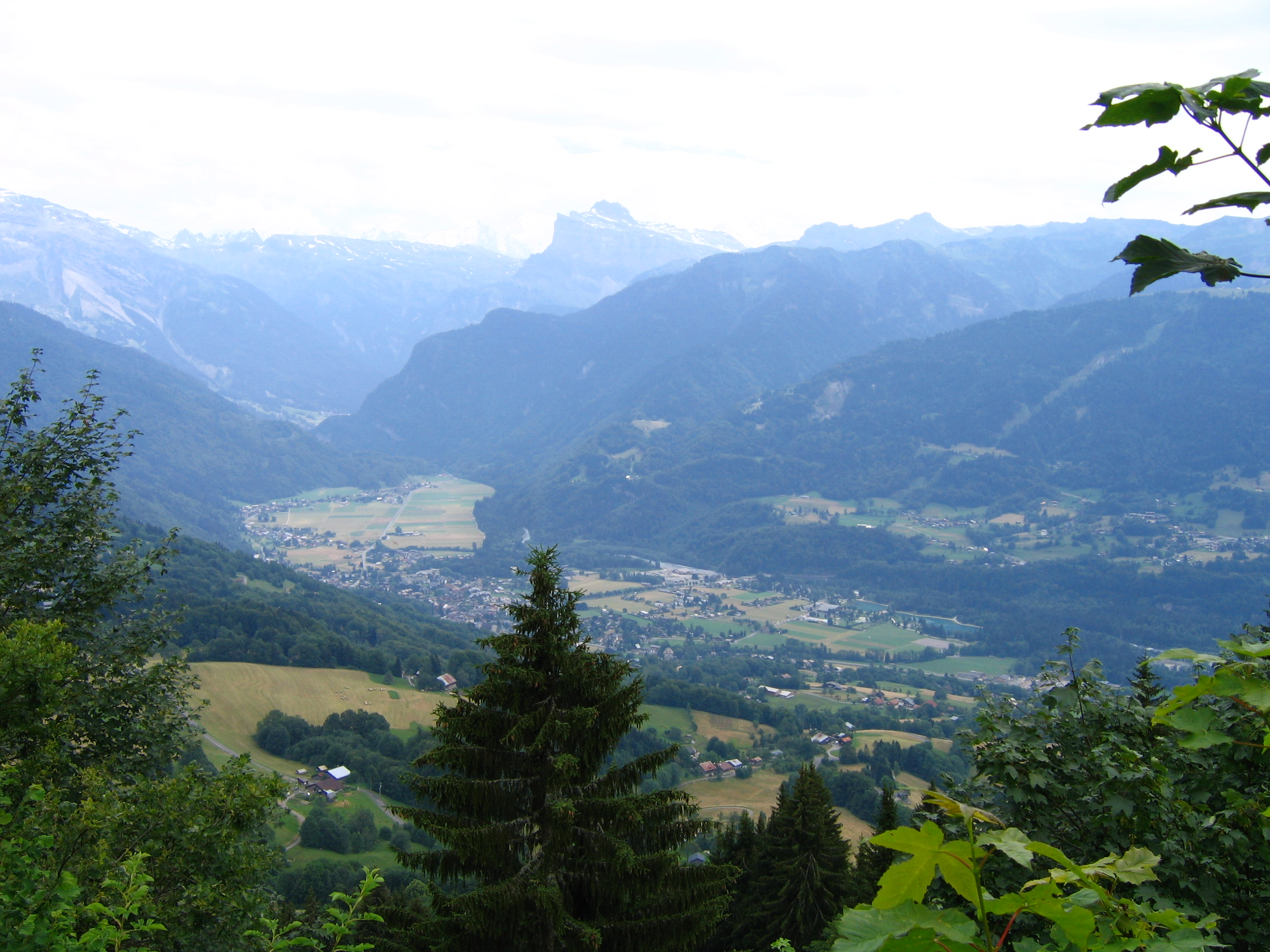 Samoens en contre bas dans la vallée